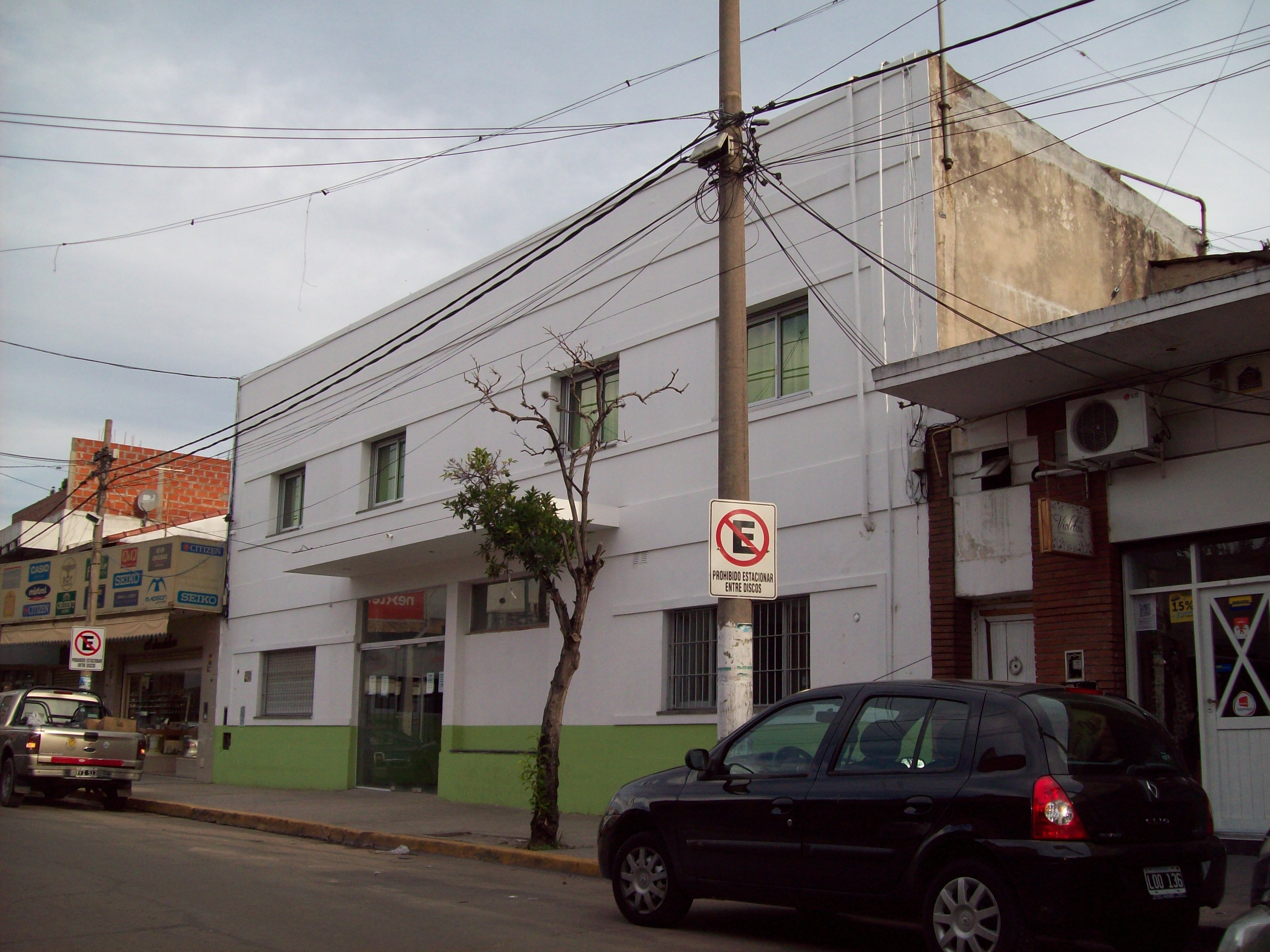 Viejo Hospital Doctor Nicolás Boccuzzi, restaurado.